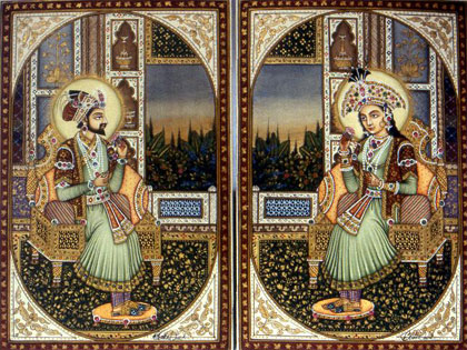 Mugahl emperor Shah Jahan and his empress Mumtaz Mahal.